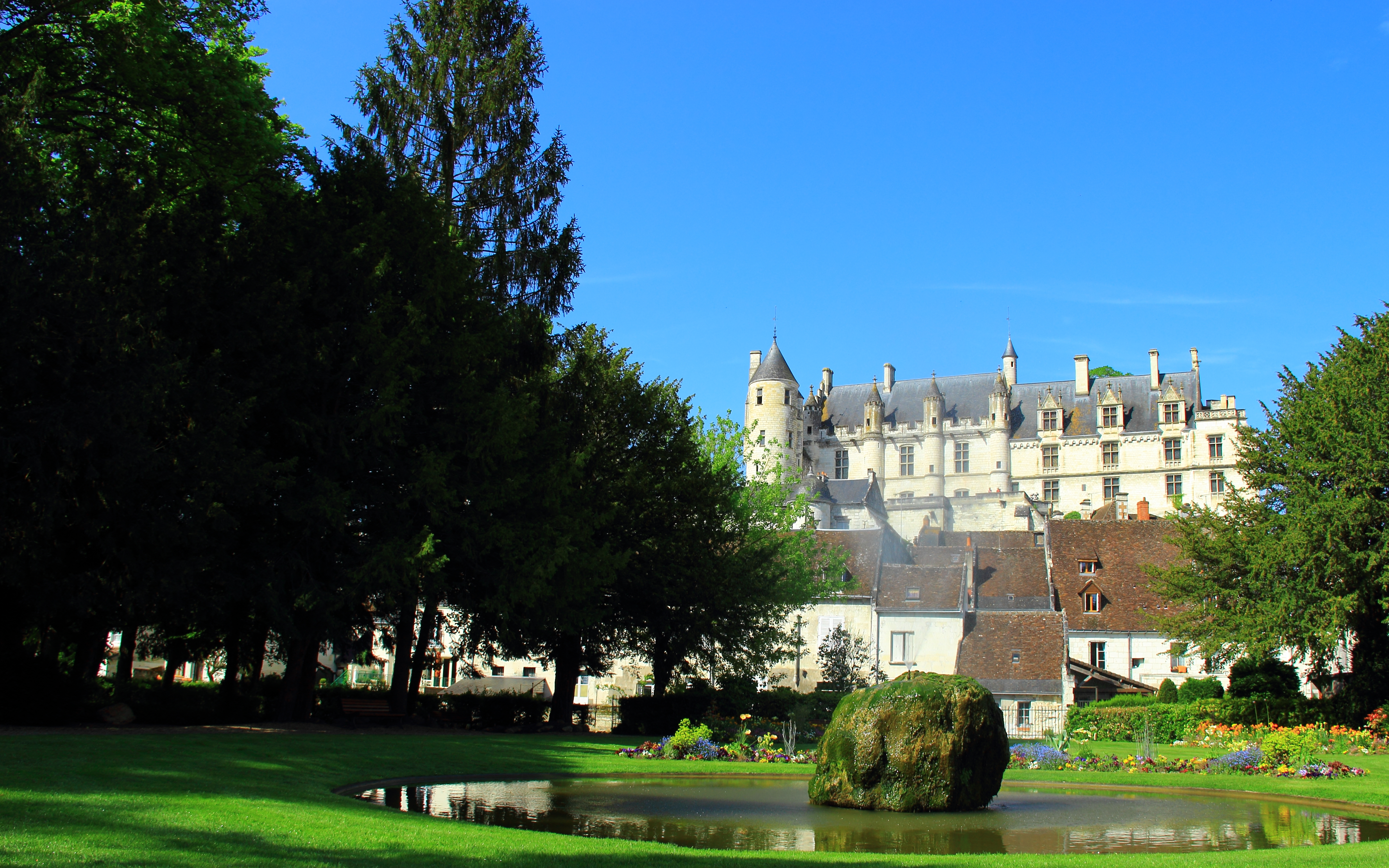 Château de Loches